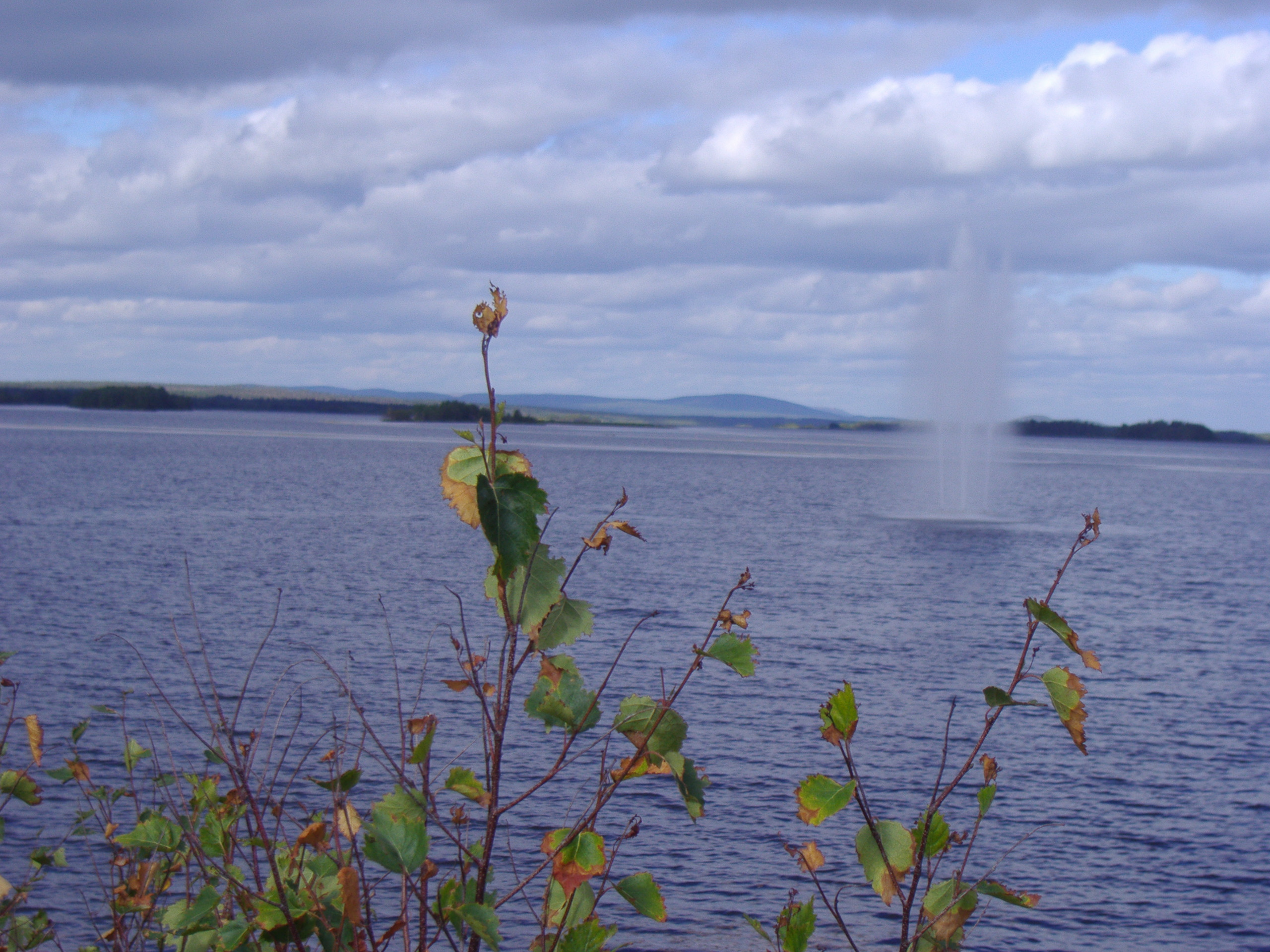 Kemijoki river broadens into lake Kemijärvi at Kemijärvi, Finland Author:Petr Glivický